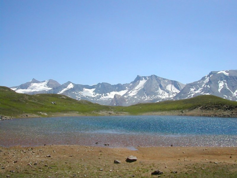 Photo personnelle. Libre de droits.